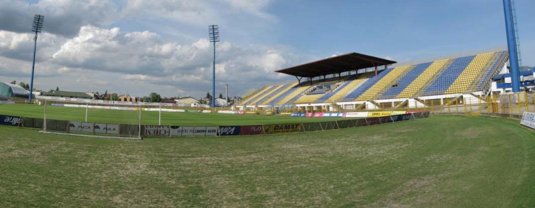 Stadion NK Inter Zaprešić